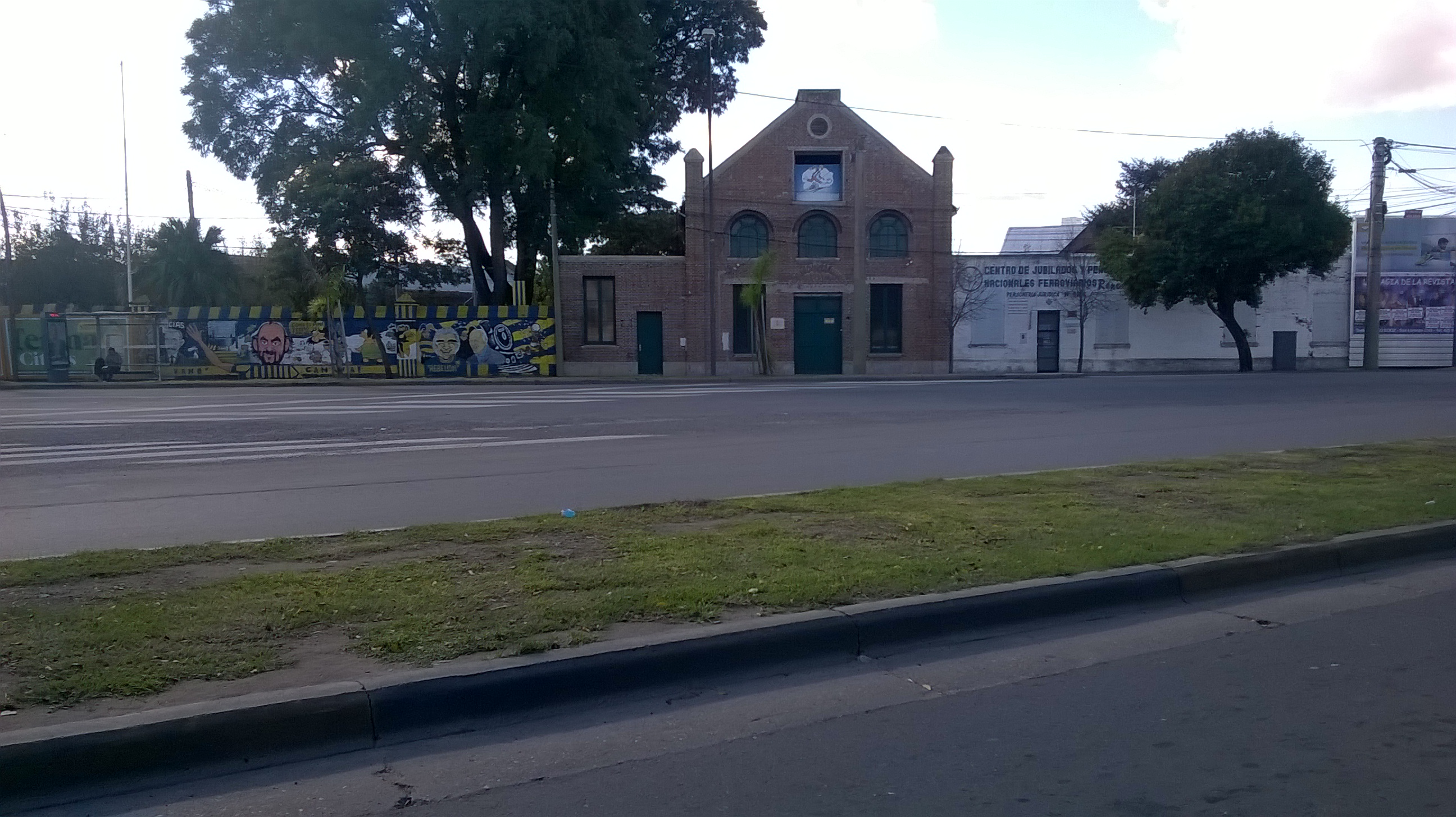 Sede fundacional del Club Atlético Rosario Central, situada en avenida Alberdi 23 bis de la ciudad de Rosario; en ella se fundó el club rosarino un 24 de diciembre de 1889.